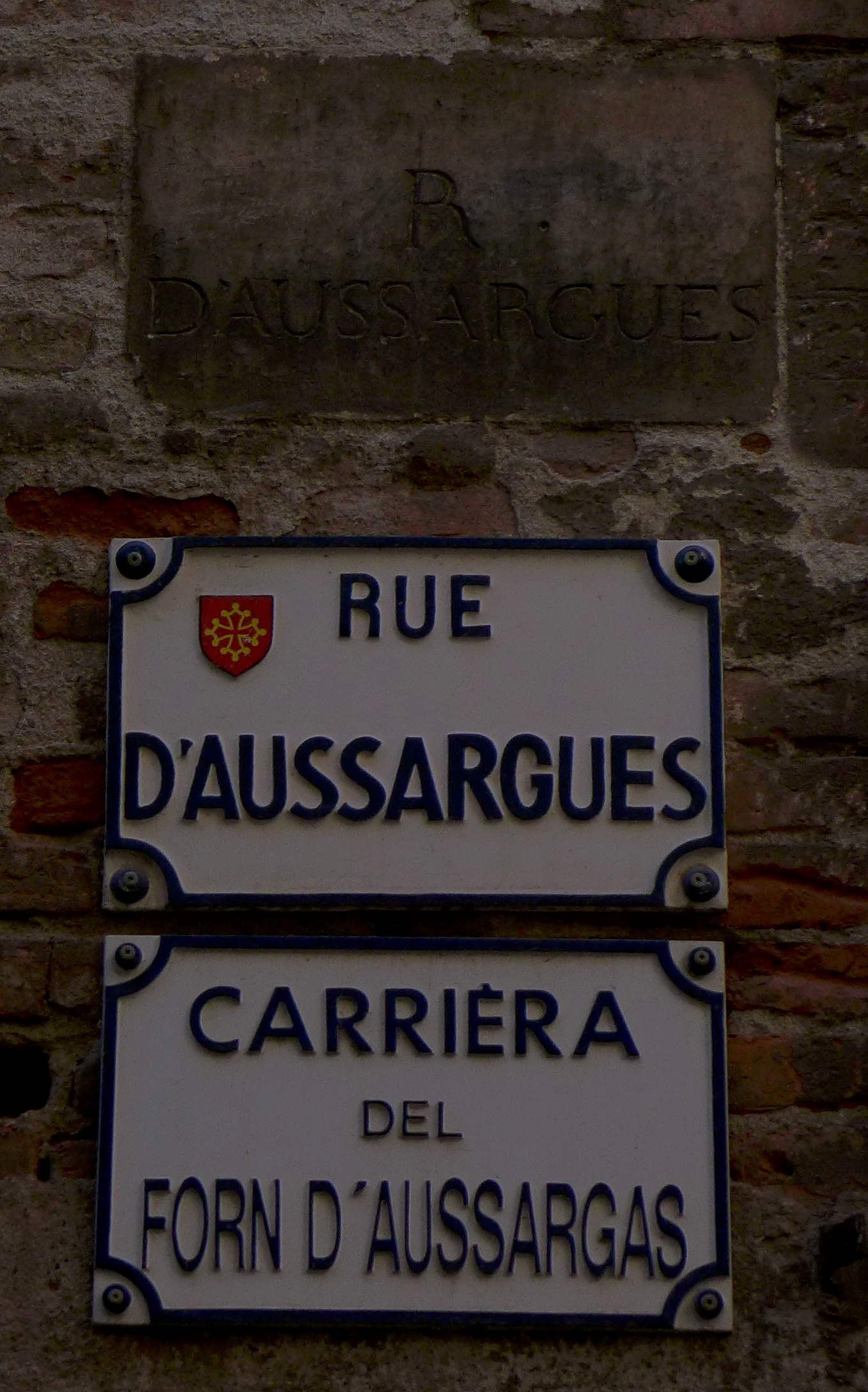 Plaques de la rue d'Aussargues ancienne en pierre (XVIIIe siècle) et récentes (français et occitan - début du XXIe siècle)